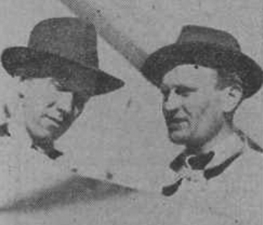 Arkitekterna Gunnar Selander och Magnus Ahlgren